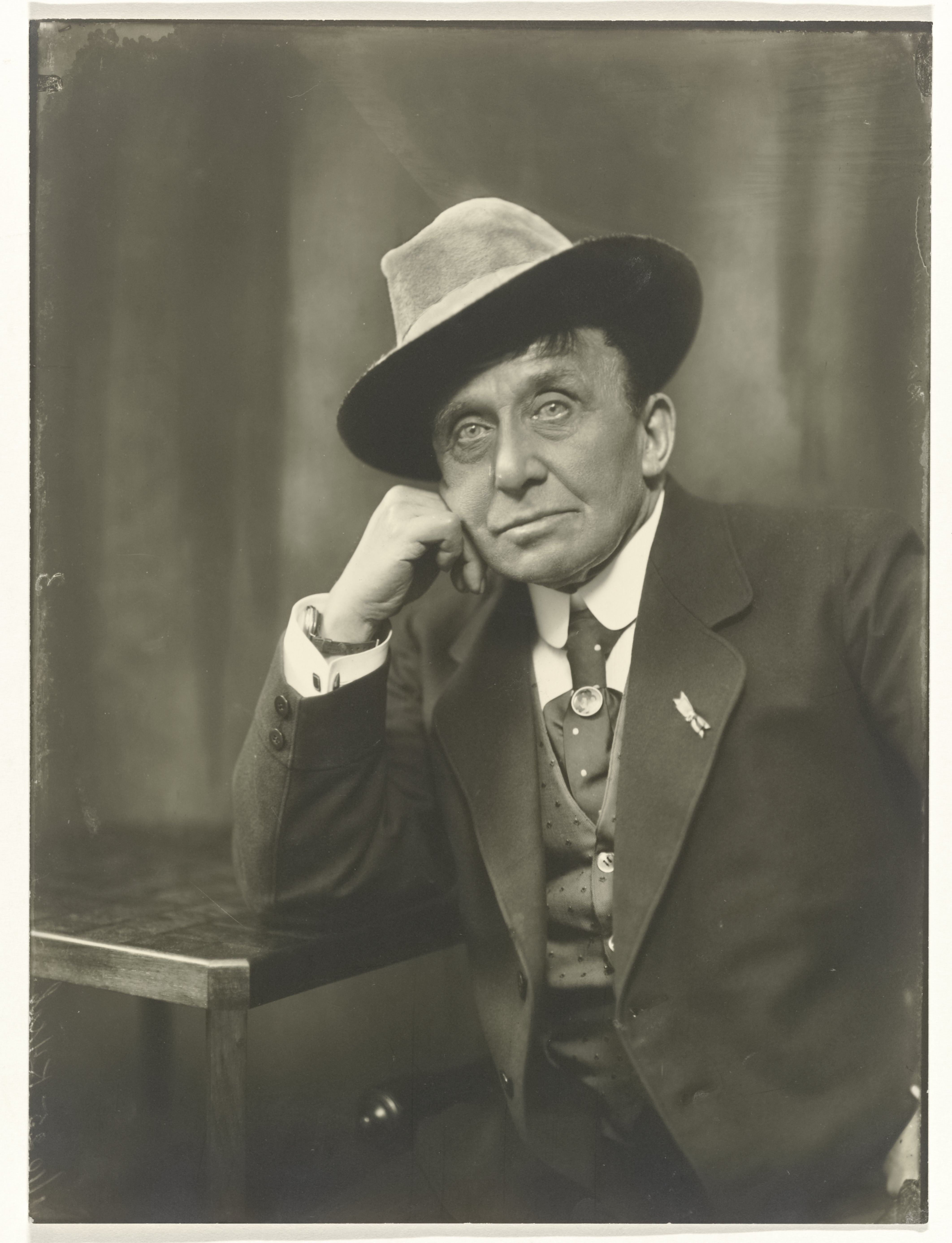 IdentificatieTitel(s): Portret van Louis Bouwmeester, acteurObjecttype: foto Objectnummer: RP-F-F04074Opschriften / Merken: annotatie, verso, geschreven: ‘Louis Bouwmeester acteur 1913, Foto J. Merkelbach’VervaardigingVervaardiger: fotograaf: Jacob Merkelbach (vermeld op object)Plaats vervaardiging: AmsterdamDatering: 1913Materiaal: fotopapier Techniek: ontwikkelgelatinezilverdrukAfmetingen: foto: h 238 mm × b 179 mmOnderwerpWie: Louis BouwmeesterVerwerving en rechtenVerwerving: overdracht van beheer 1994Copyright: Publiek domein